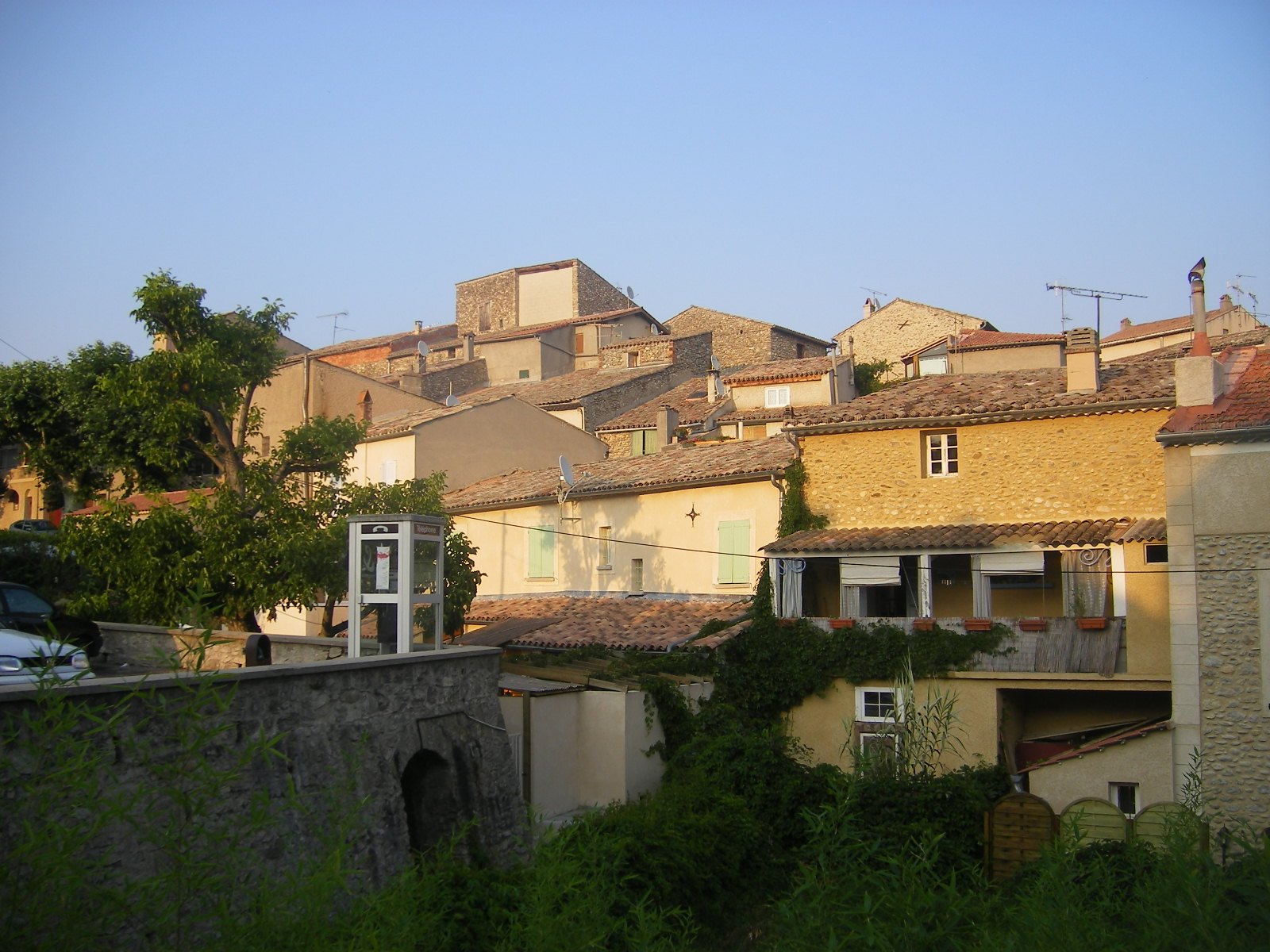 La Brillanne